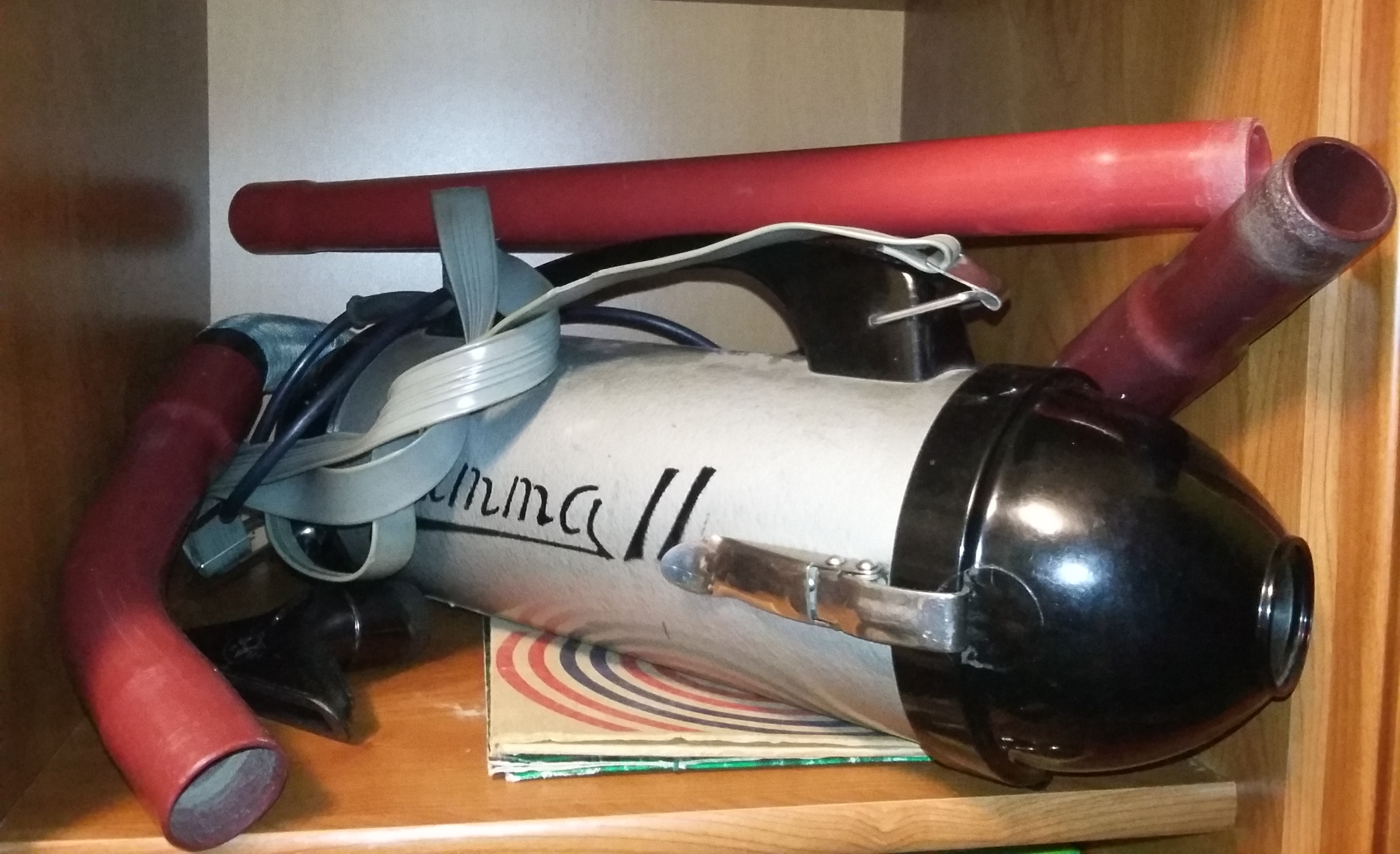 Odkurzacz Gamma II wraz częścią wyposażenia